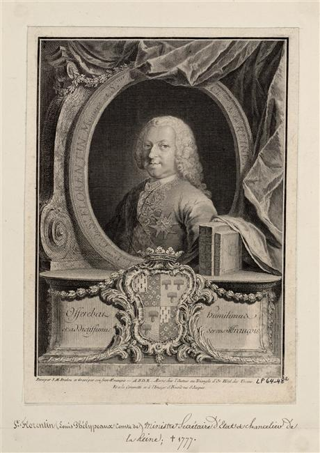 Gravure de Jean-Charles François d'après Fredou - Phélypeaux